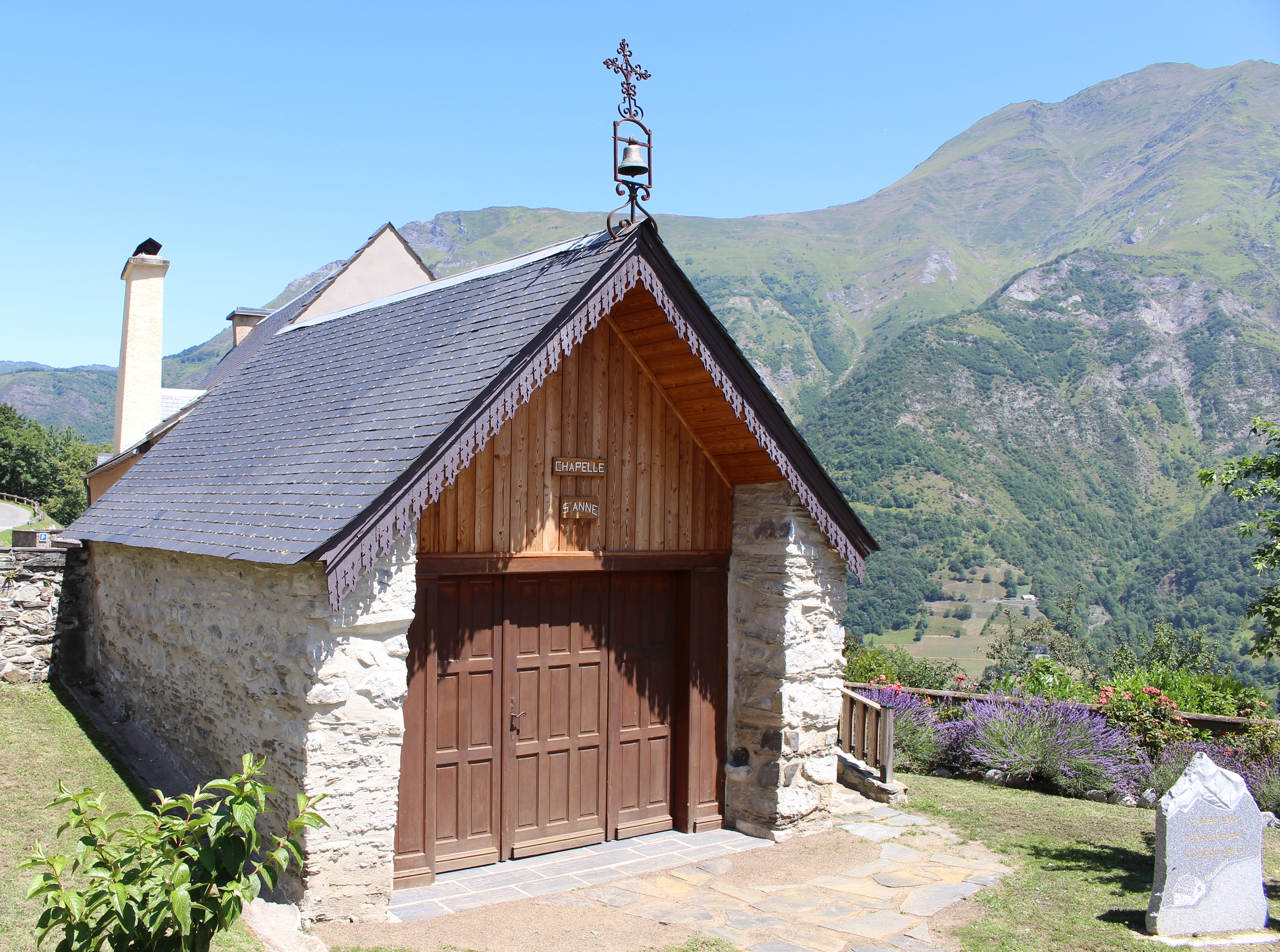 Chapelle Sainte-Anne de Grust (Hautes-Pyrénées)